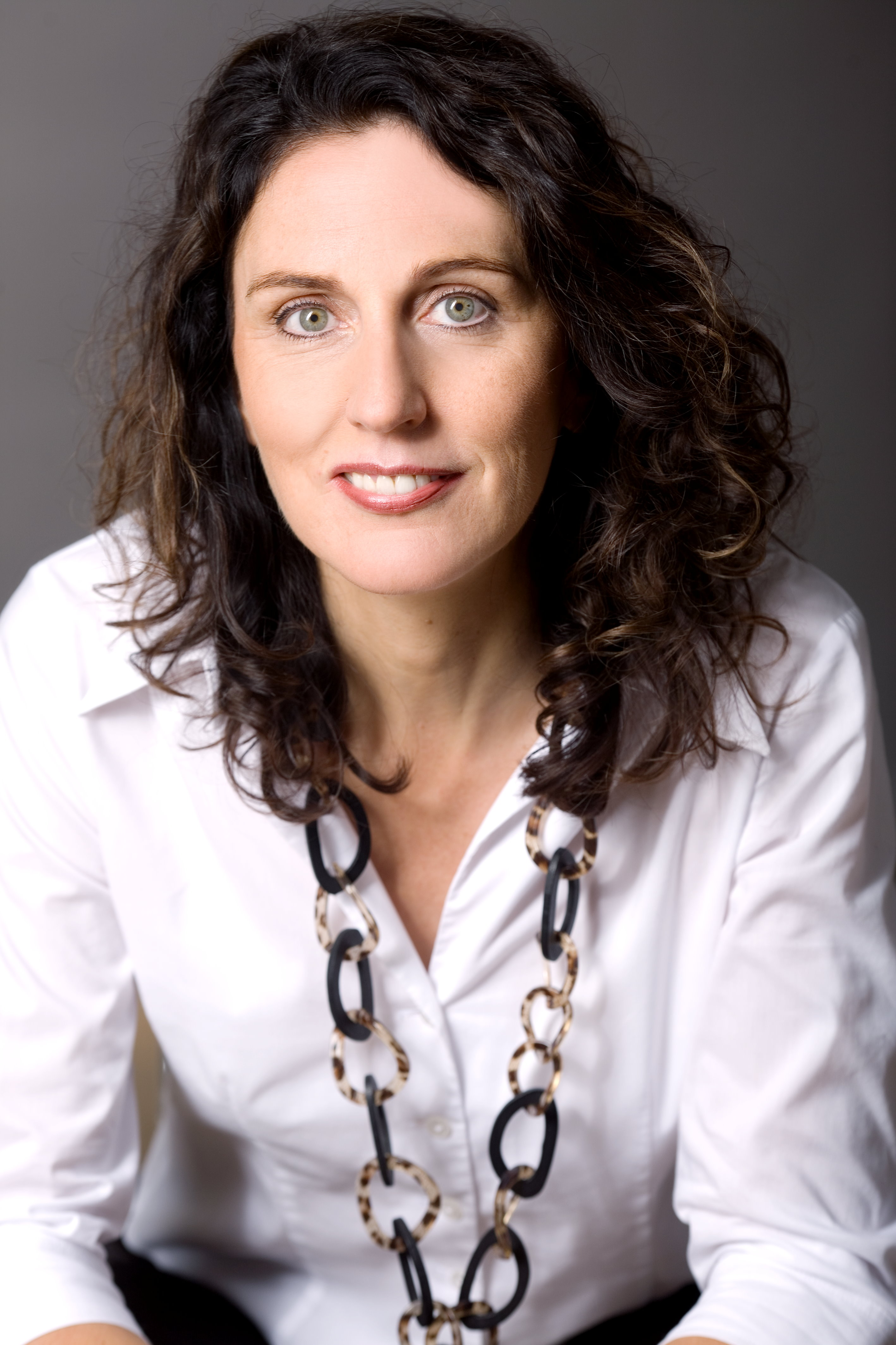 Die deutsche Schriftstellerin und Rednerin Anja Förster